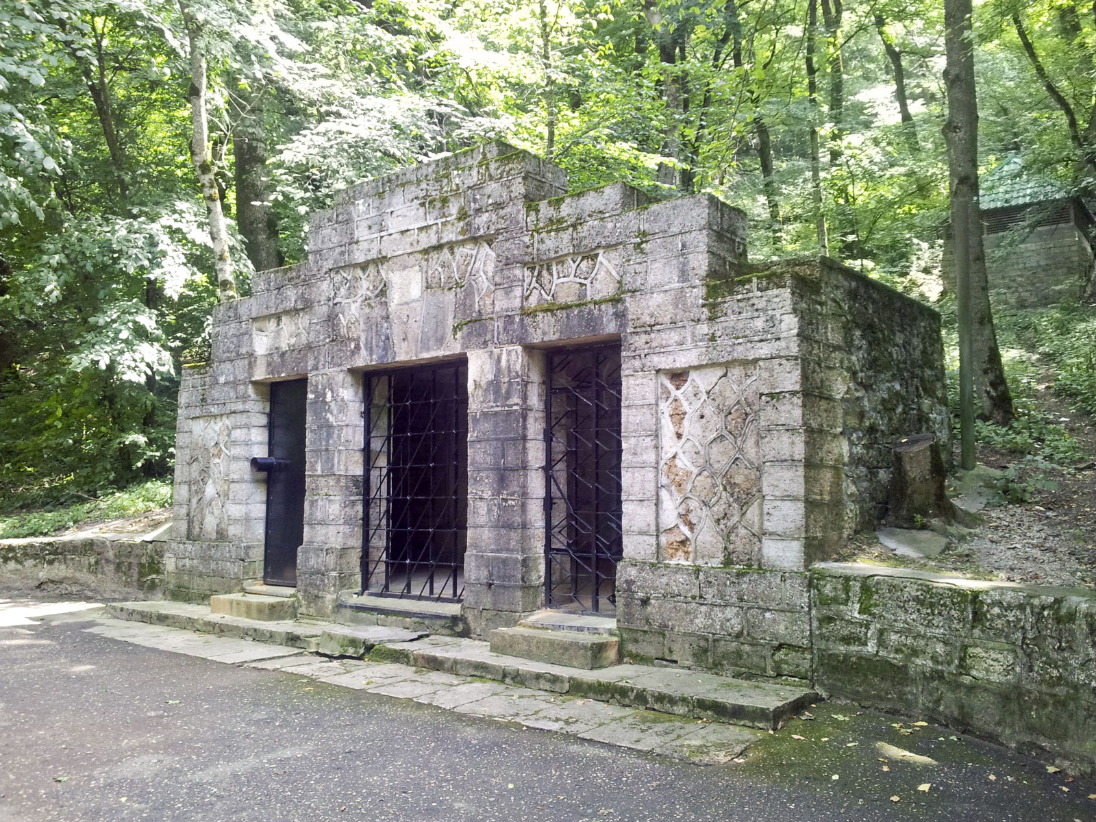 Заброшенный бювет Владимирского источника